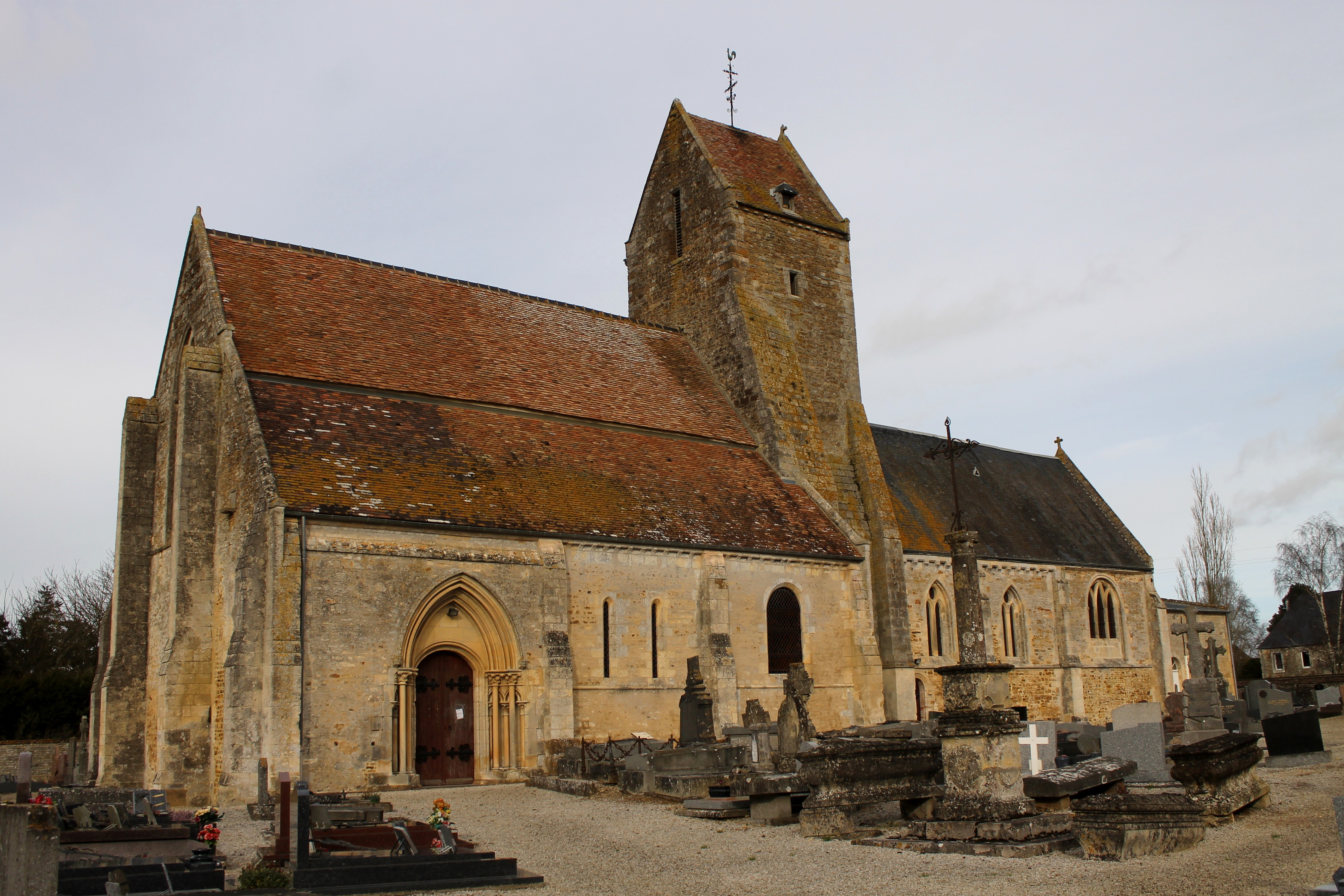 Église de l'Assomption-de-Notre-Dame de Cesny à Cesny-Bois-Halbout (Calvados)